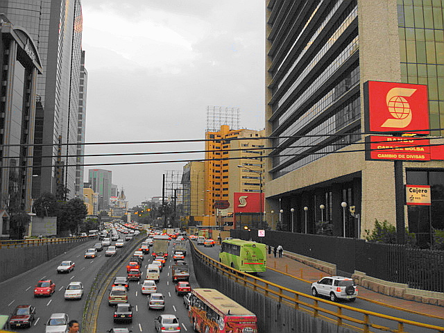 Periferico Polanco.